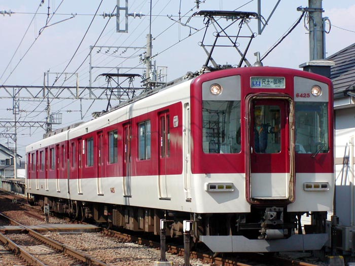 近鉄 6432系